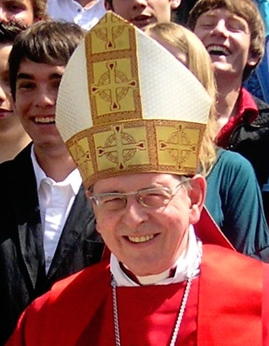 Bischof Kurt Koch 24.5.2009 Firmung Solothurn, vor der St. Ursenkathedrale